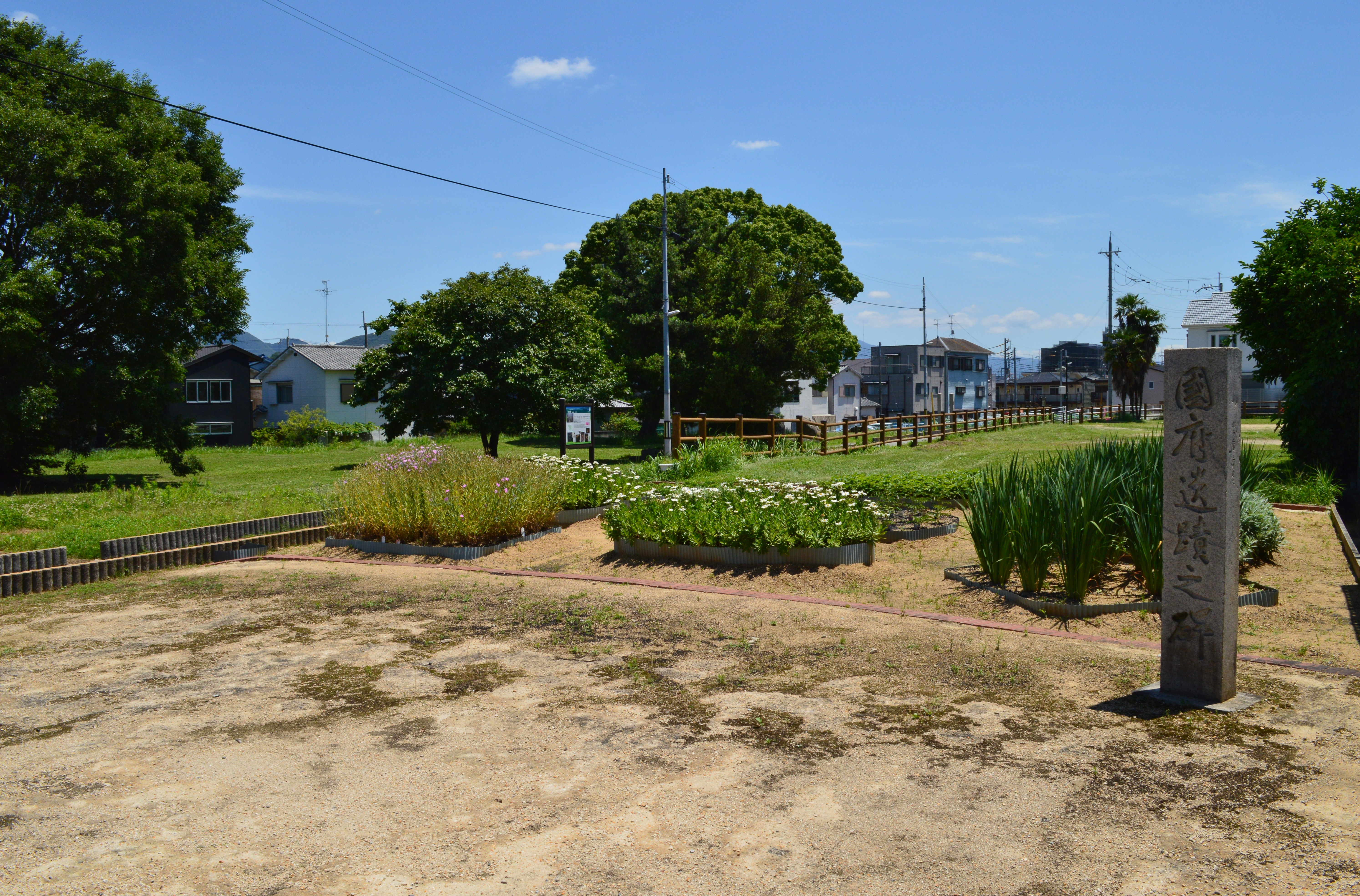 国府遺跡 (藤井寺市) 石碑付近